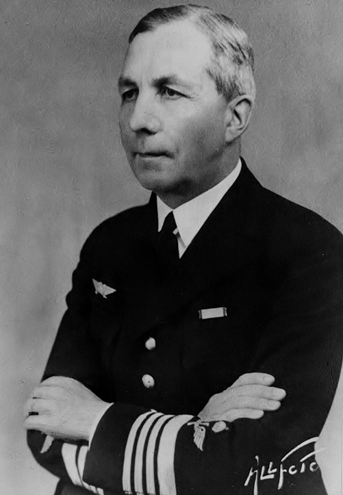 Porträttfotografi av Herman Sundin, flottiljchef för Roslagens flygflottilj (F 2) åren 1936 - 1944. Tillhör F 2-samlingen med nummer F 2 FM 502. Ur Flygvapenmuseums bildarkiv.